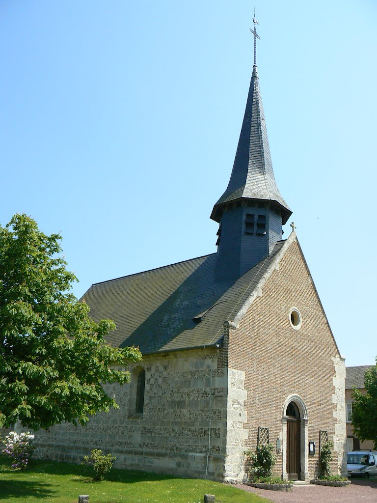 Eglise de Caugé